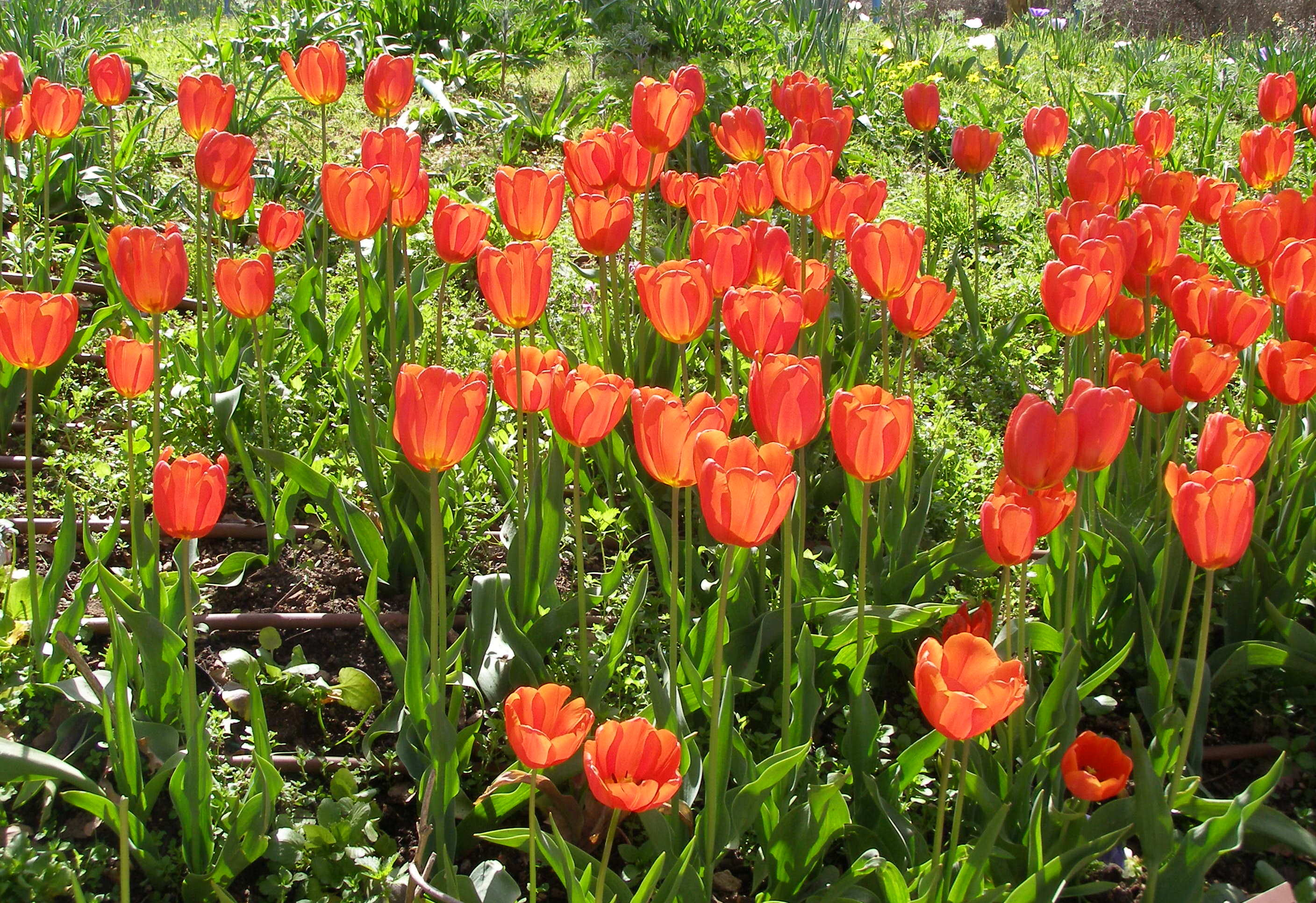 חלקת צבעוני רחב עלים (Tulipa gesneriana) בפריחה בגן הבוטני בירושלים. צבעוני רחב עלים הוא צמח נוי תרבותי ממשפחת השושניים. זהו גאופיט בעל בצל שמקורו באסיה. בזכות צבעיהם היפים טופחו זנים רבים של צבעוני, והם נפוצים ברחבי העולם הן בגינון והן למטרות קטיף. במיוחד מפורסמים שדות הצבעונים רחבי הידיים בהולנד. בישראל שותלים את הצבעוני בחורף, הוא גדל לגובה כ-50 ס"מ ופורח באביב במגוון צבעים.